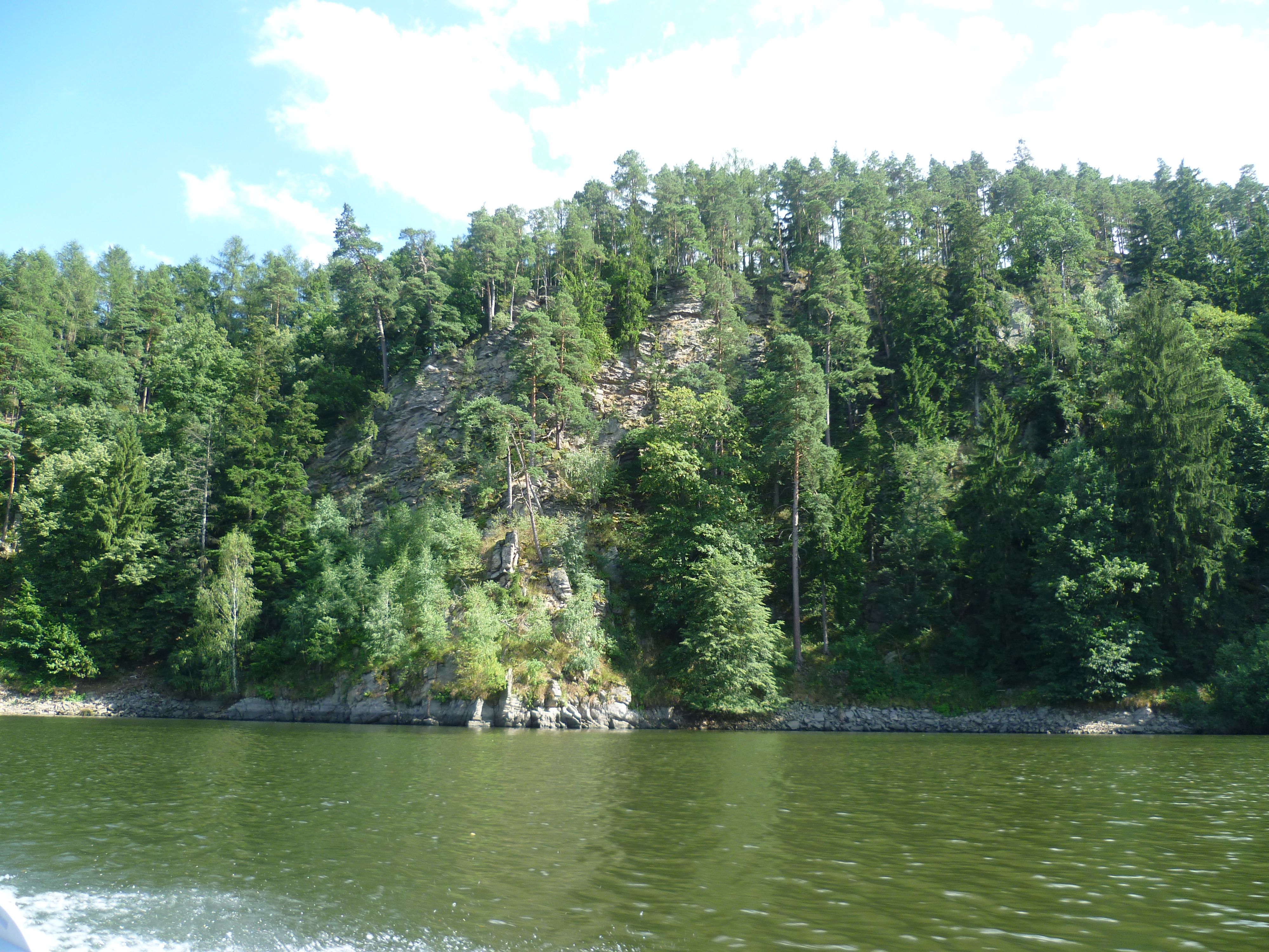 skaliska pod Plešickou tvrzí-alibaba